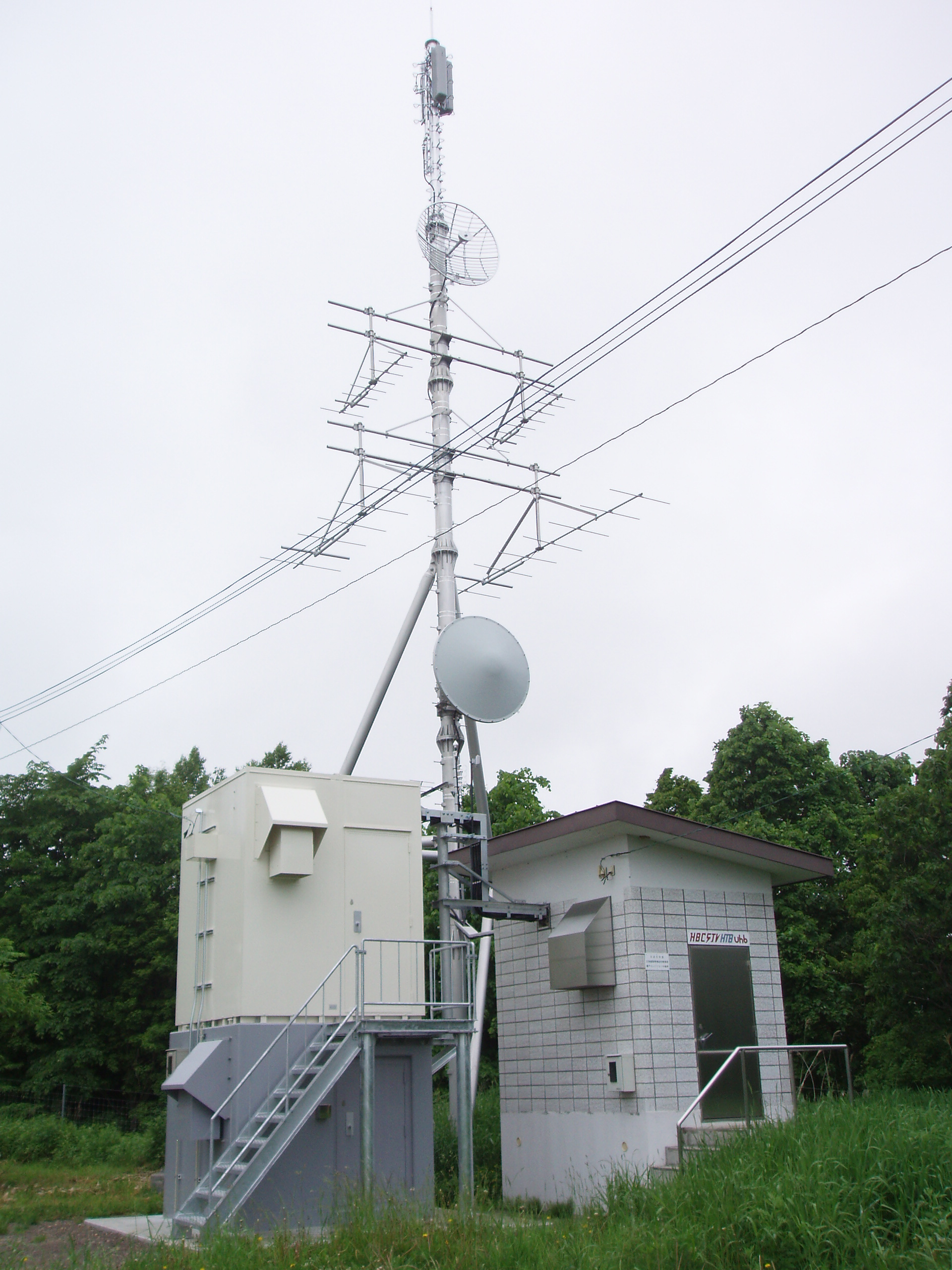 置戸中継局 NHK・HBC・STV・HTB・UHB送信設備